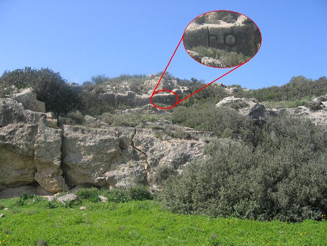 הכתובת העתיקה בקרבת חורבת קרתא.תמונה שצילמתי, ערכתי והעלתי במרץ 2006.אסף.צ 13:58, 3 מרץ 2006 (UTC)